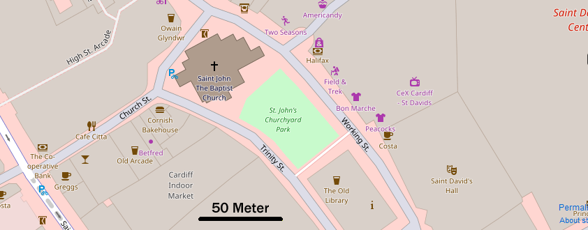 Lages des St. John’s Churchyard Park